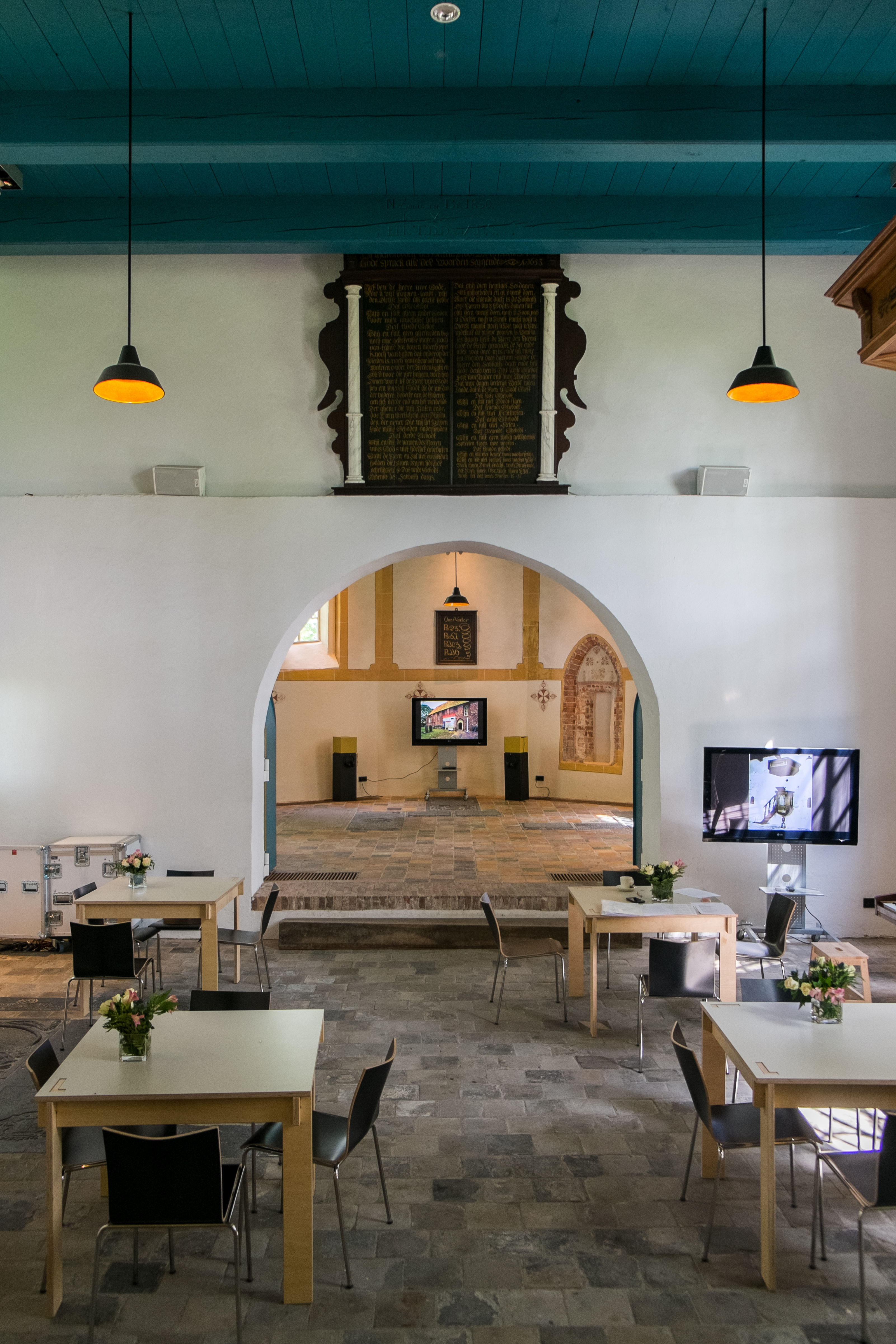 Interieur van de kerk van Leegkerk